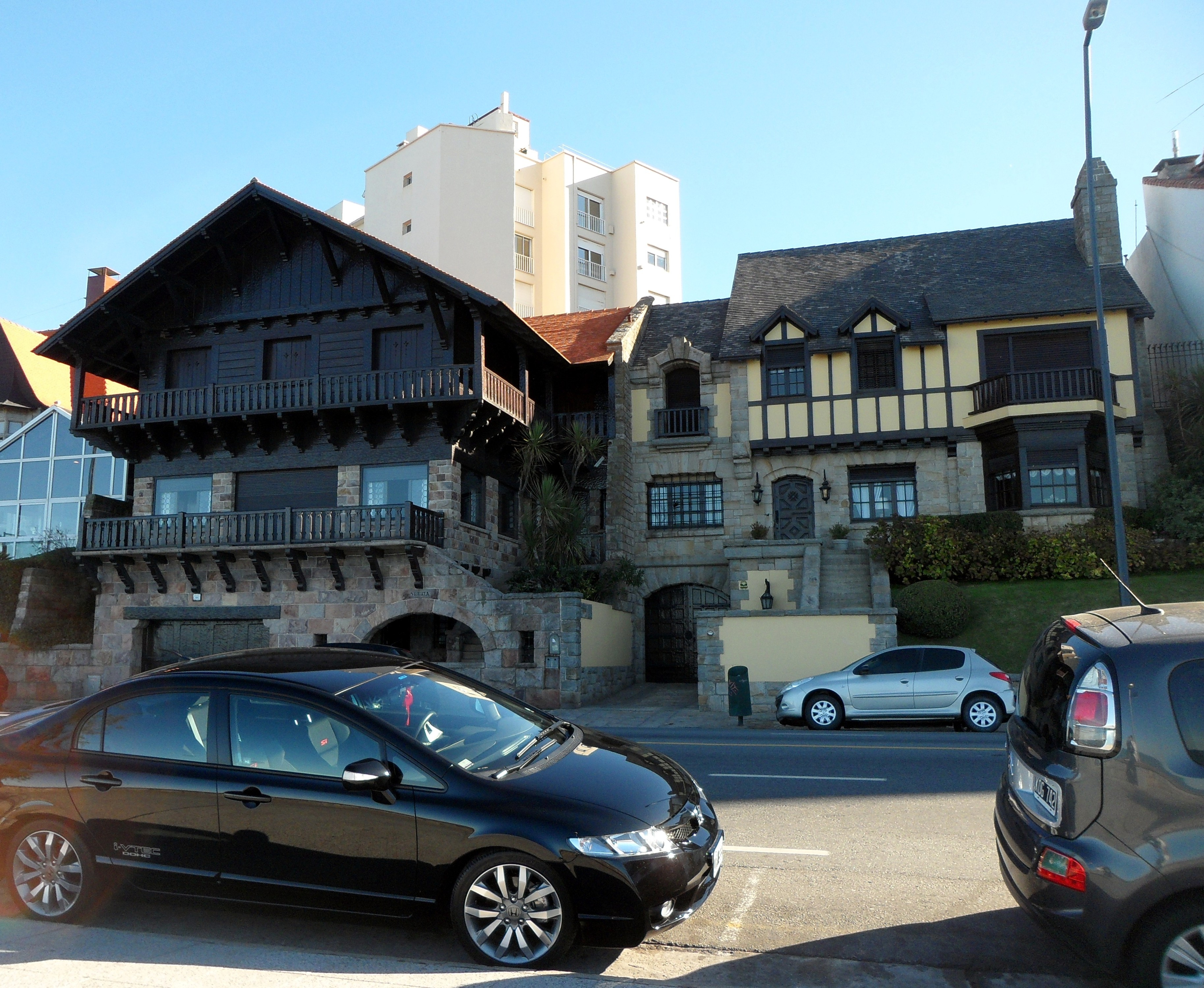 antiguas